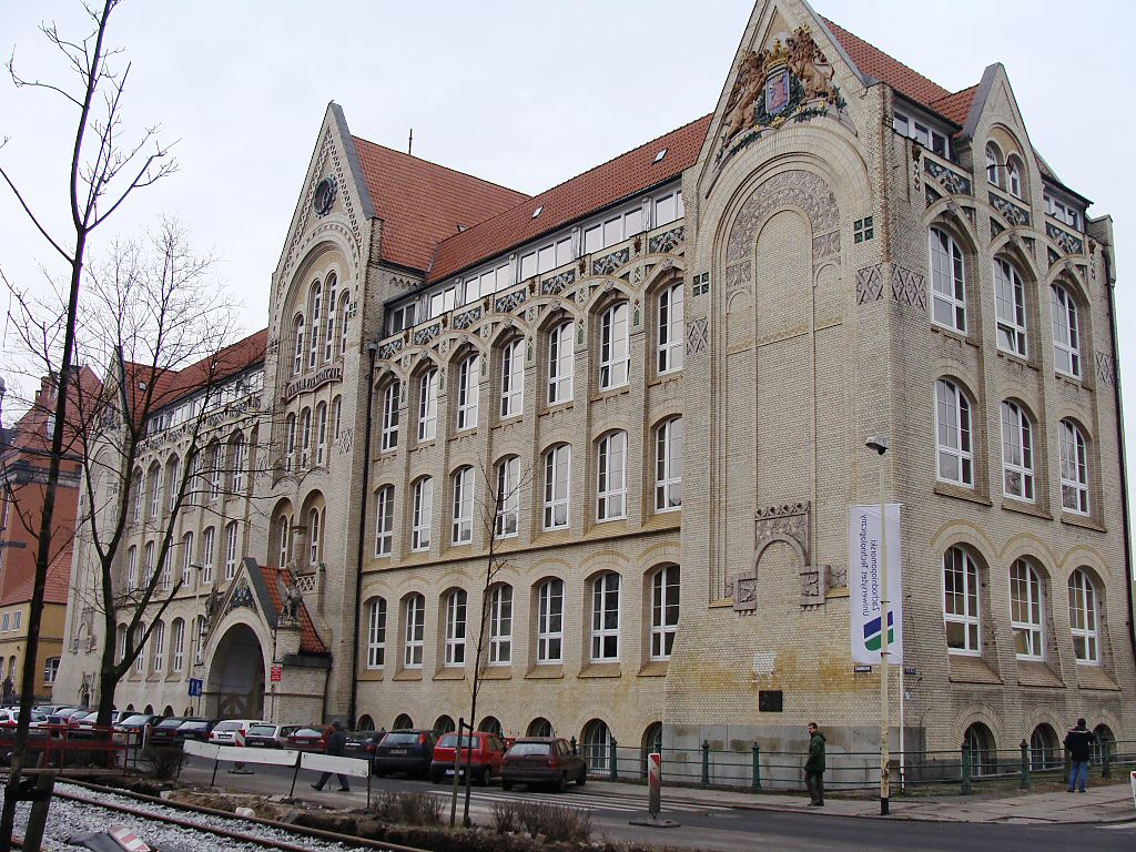 Szczecin, ul. Sikorskiego 37 (Wydział Elektryczny Zachodniopomorskiego Uniwersytetu Technologicznego)